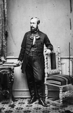 Csengery Antal portréja. Schrecker Ignác felvétele